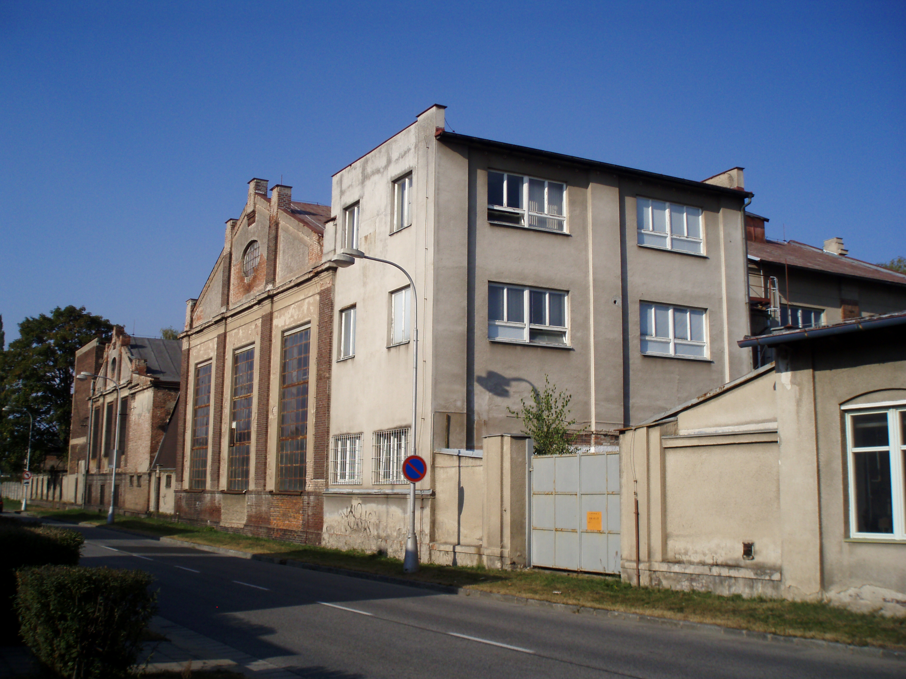 Areál ZVU, bývalých Závodů Vítězného února